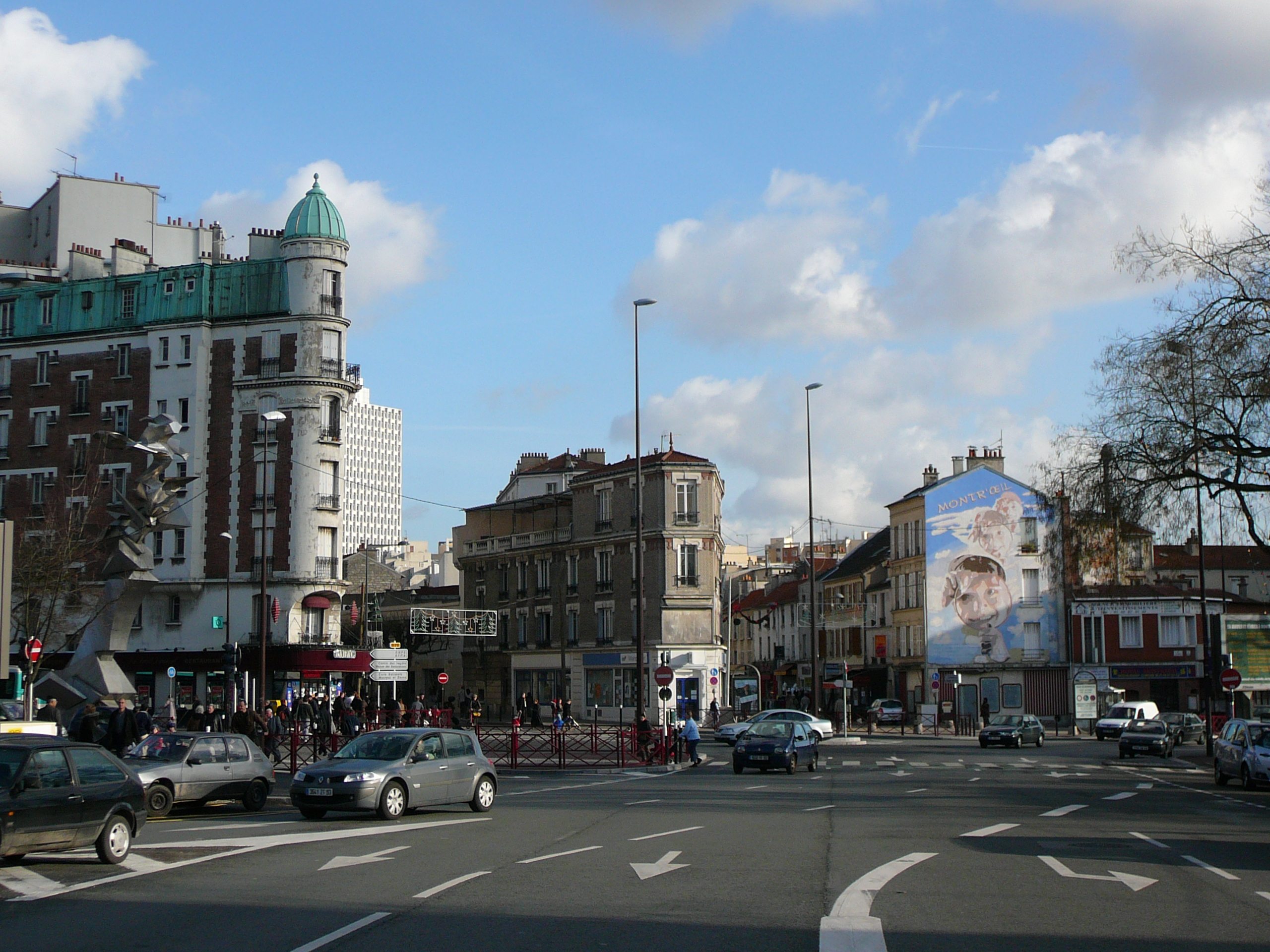 Croix de Chavaux, place Jaques Duclos, Montreuil, France